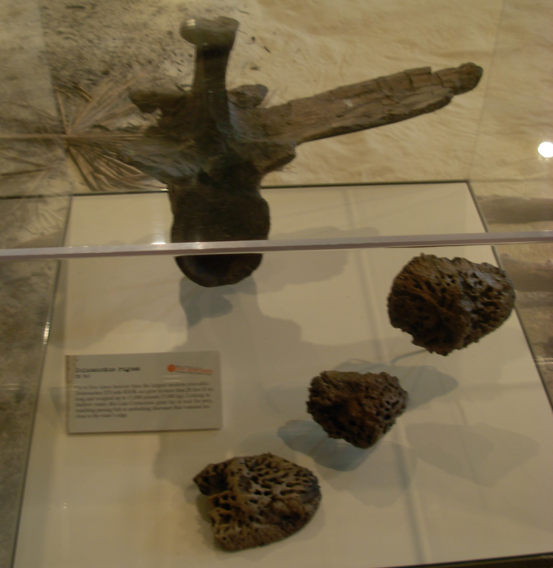 Deinosuchus scutes and vertebra